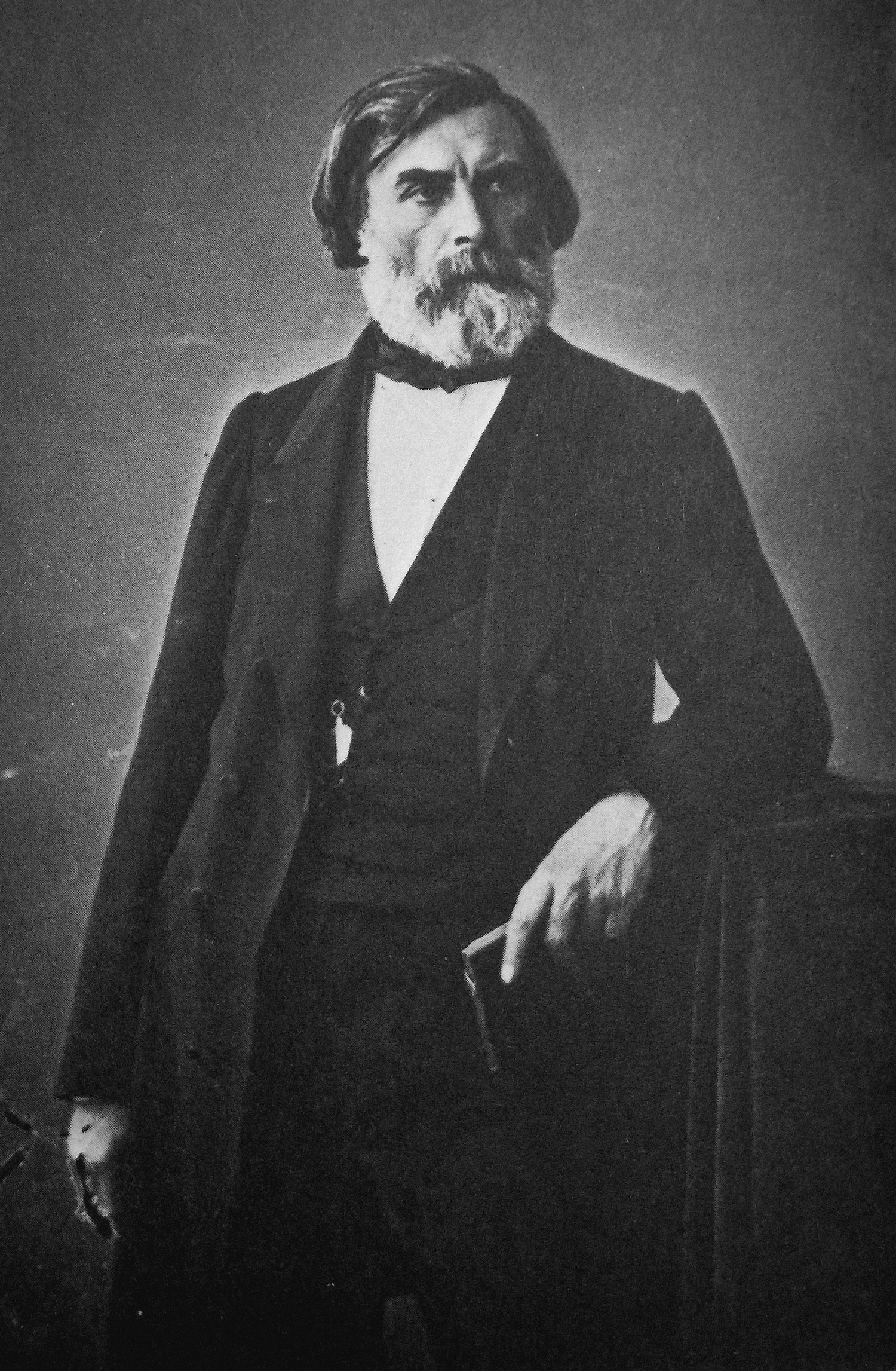 Portrait d'Auguste-Louis-Marie Ottin. Photographie par Nadar. Bibliothèque nationale de France, cabinet des estampes (Na 235/668).